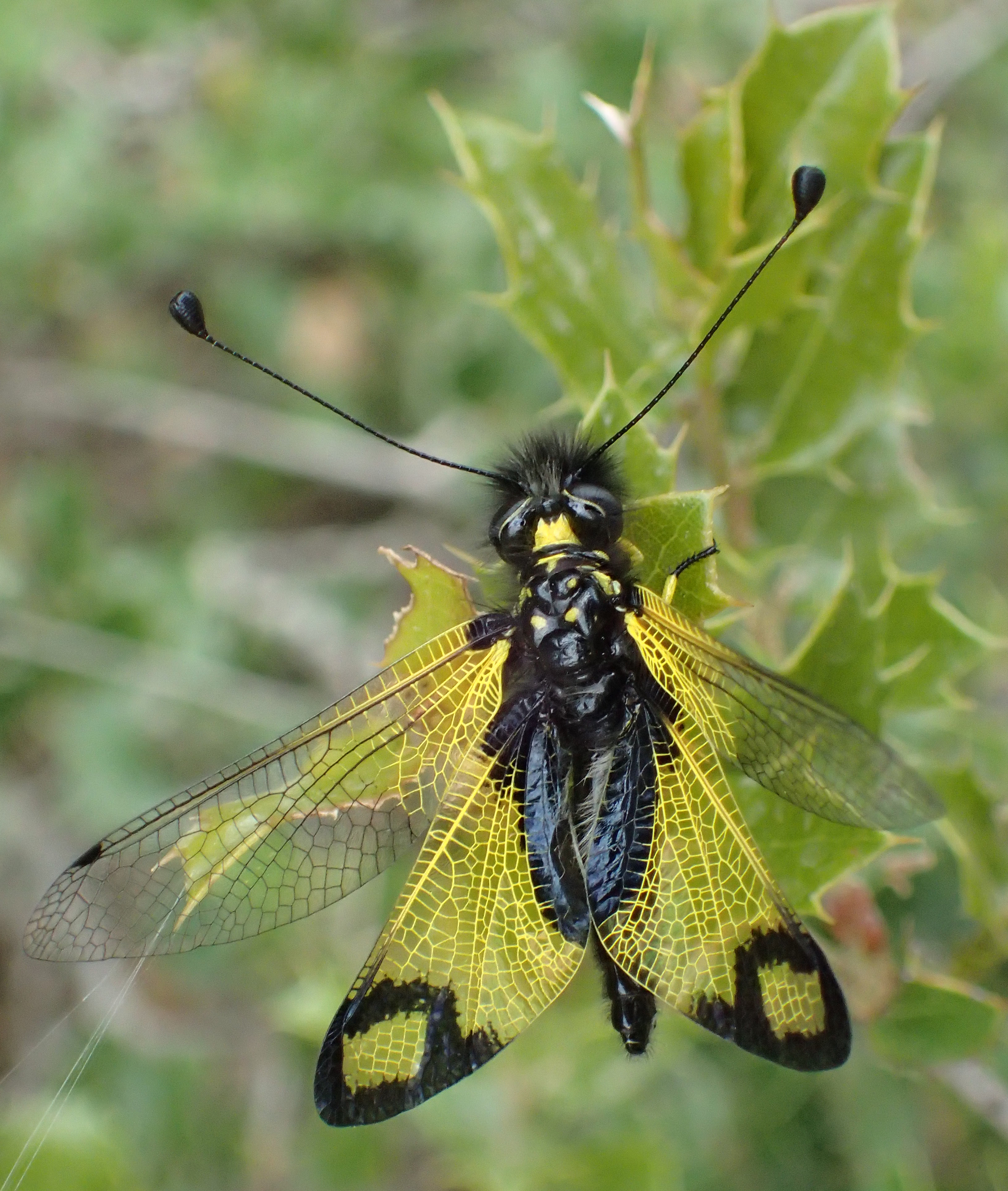 Libelloides rhomboideus Weibchen, Griechenland, Peloponnes, bei Andritsena am 16. Mai 2016